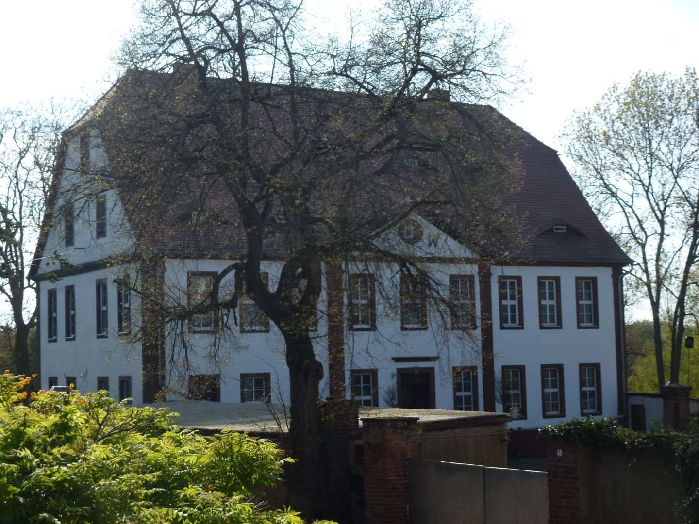 Herrenhaus des Ritterguts Osterfeld